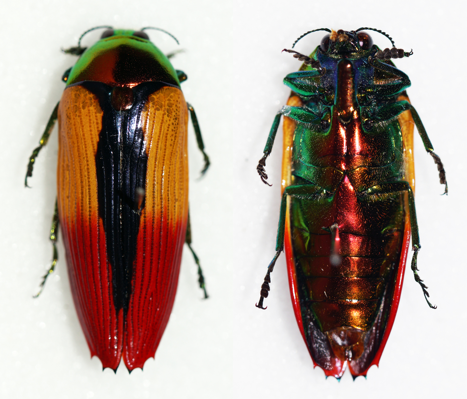 Buprestidae - In collection